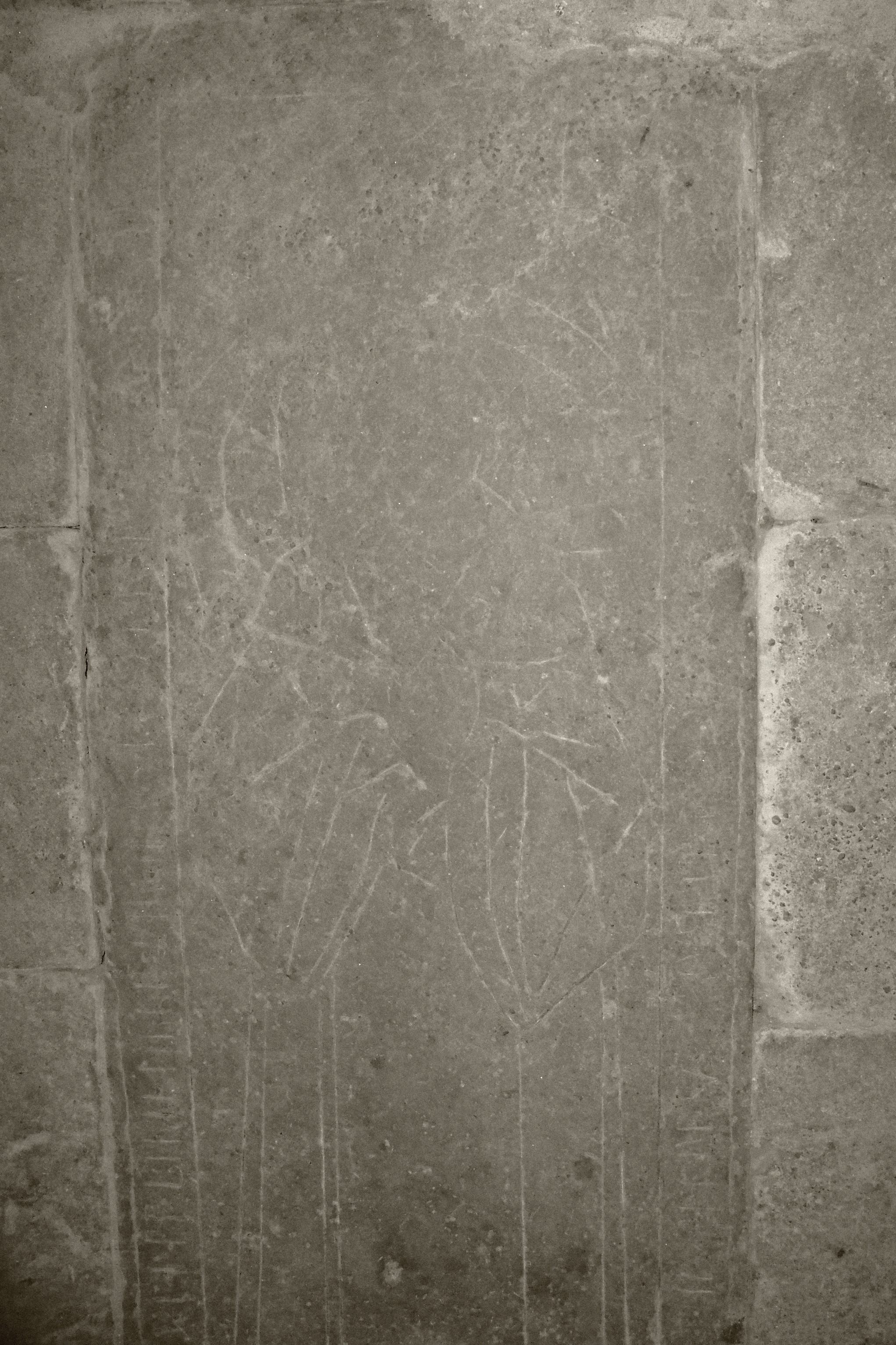 Guillaume II de Joyeuse inhumé sous cette dalle à Joyeuse (Ardèche)